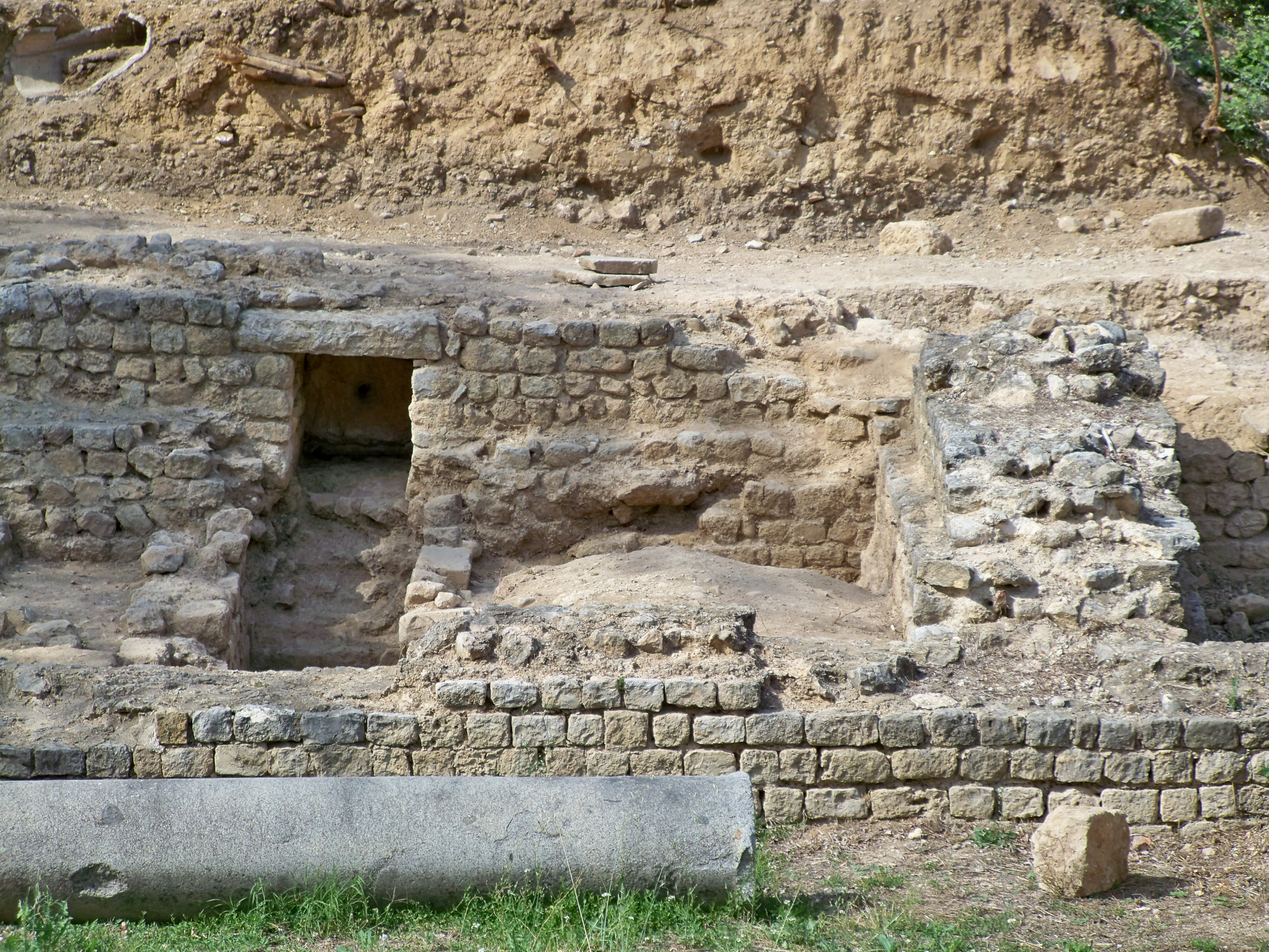 Fouilles près du baptistère de Riez (04)